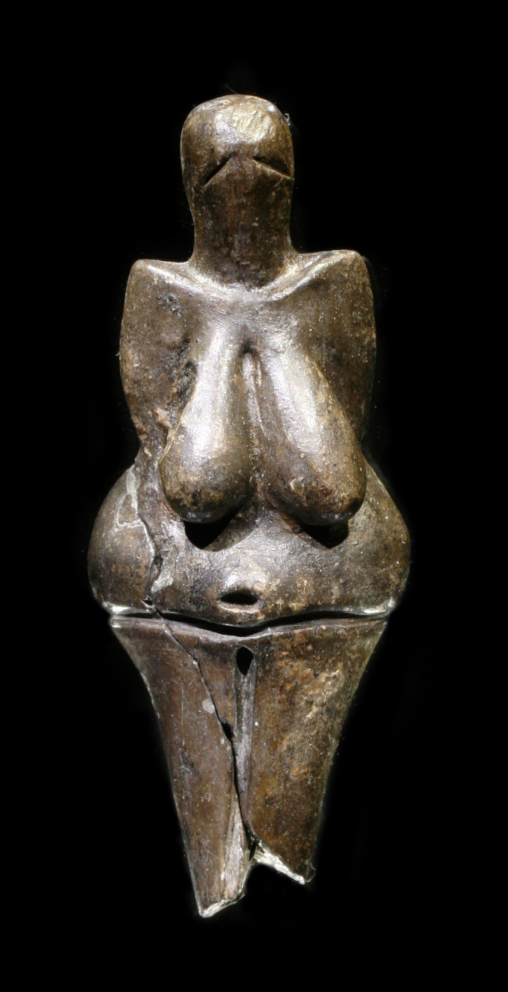 Věstonická venuše na výstavě Lovci mamutů v Národním muzeu v Praze